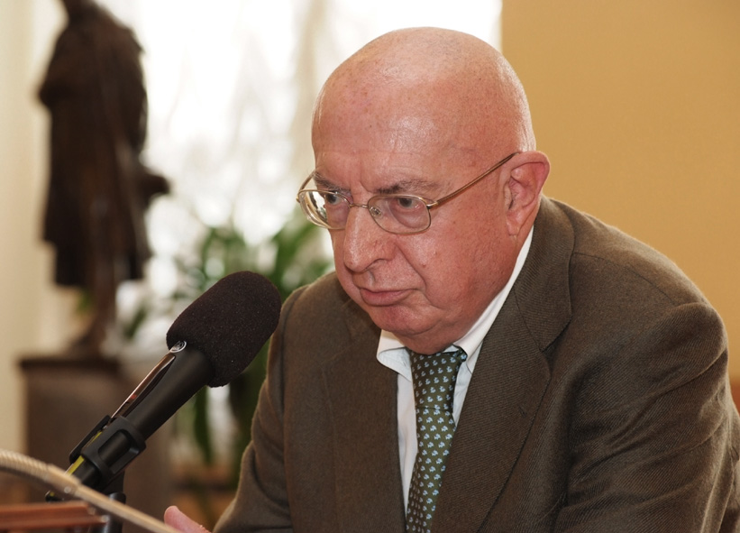 Vittorio Strada